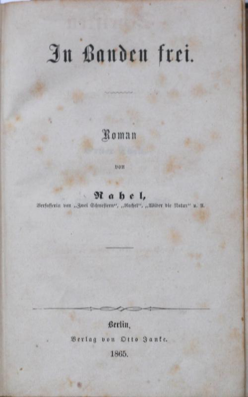 Rahel (Meyer): In Banden frei. Roman. Berlin : Otto Janke, 1865 (Rahel Meyer unter Pseudonym)